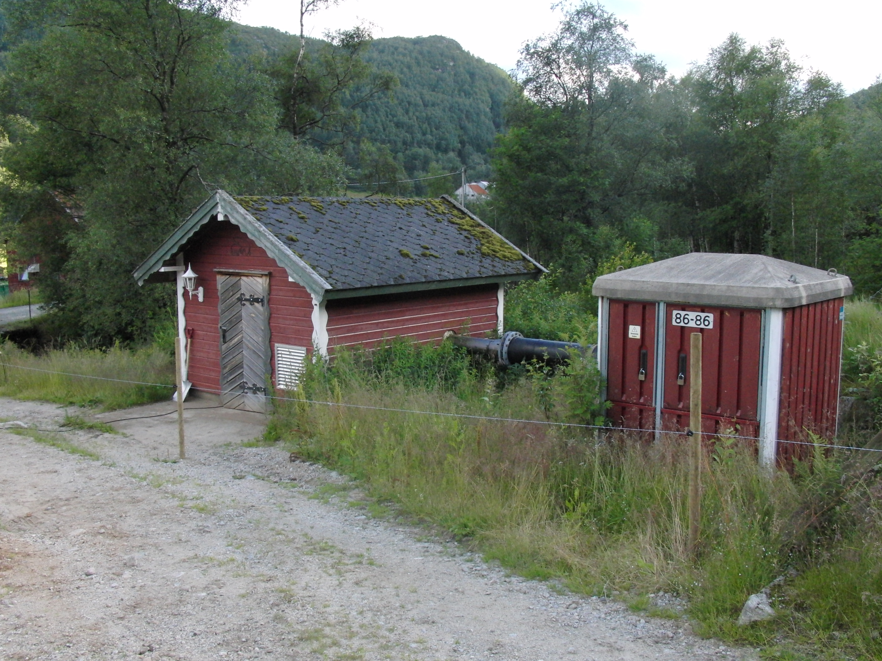 Brekkebekken kraftverk